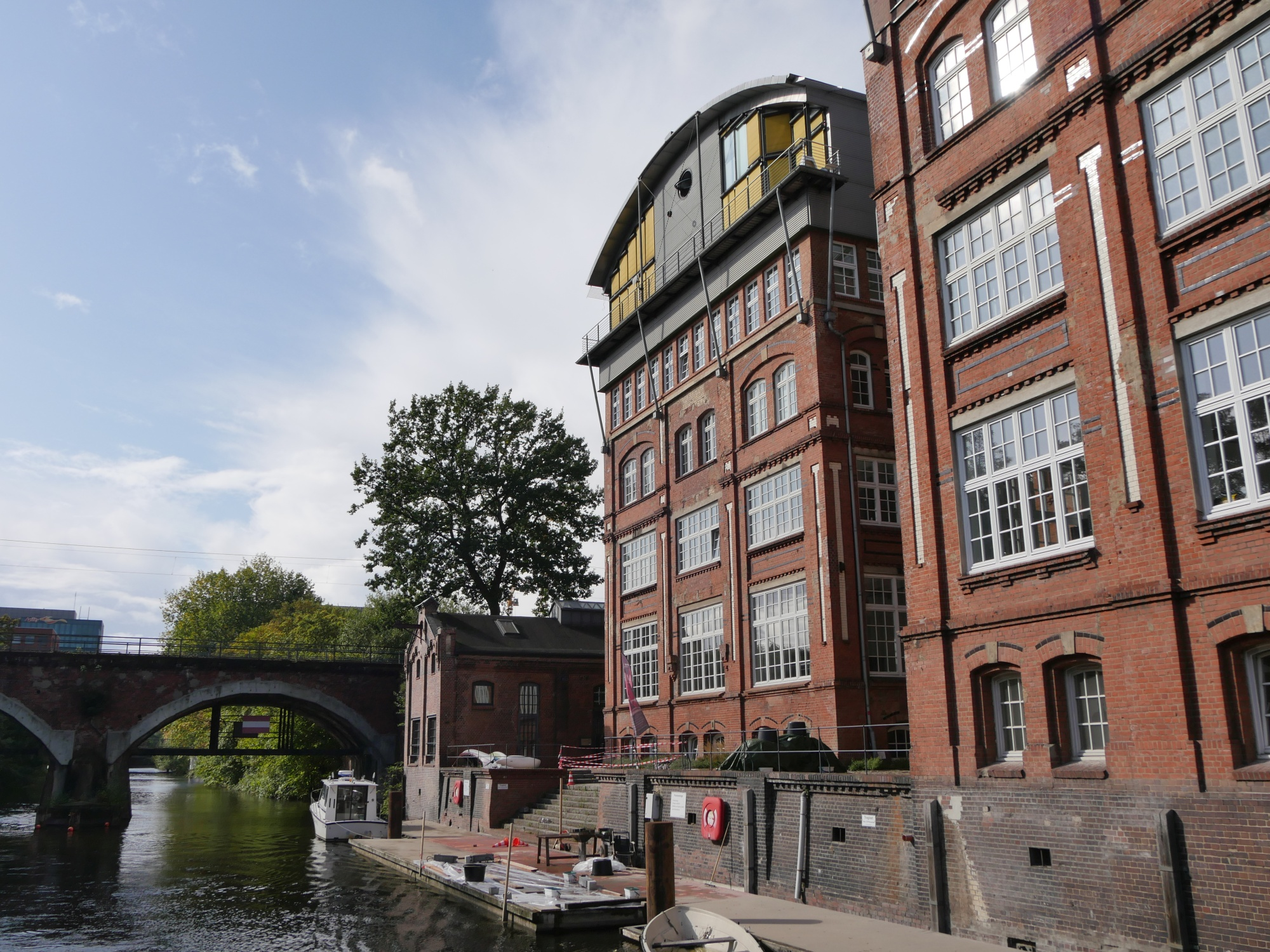 Hammerbrook: Südkanal, Schokoladenfabrik